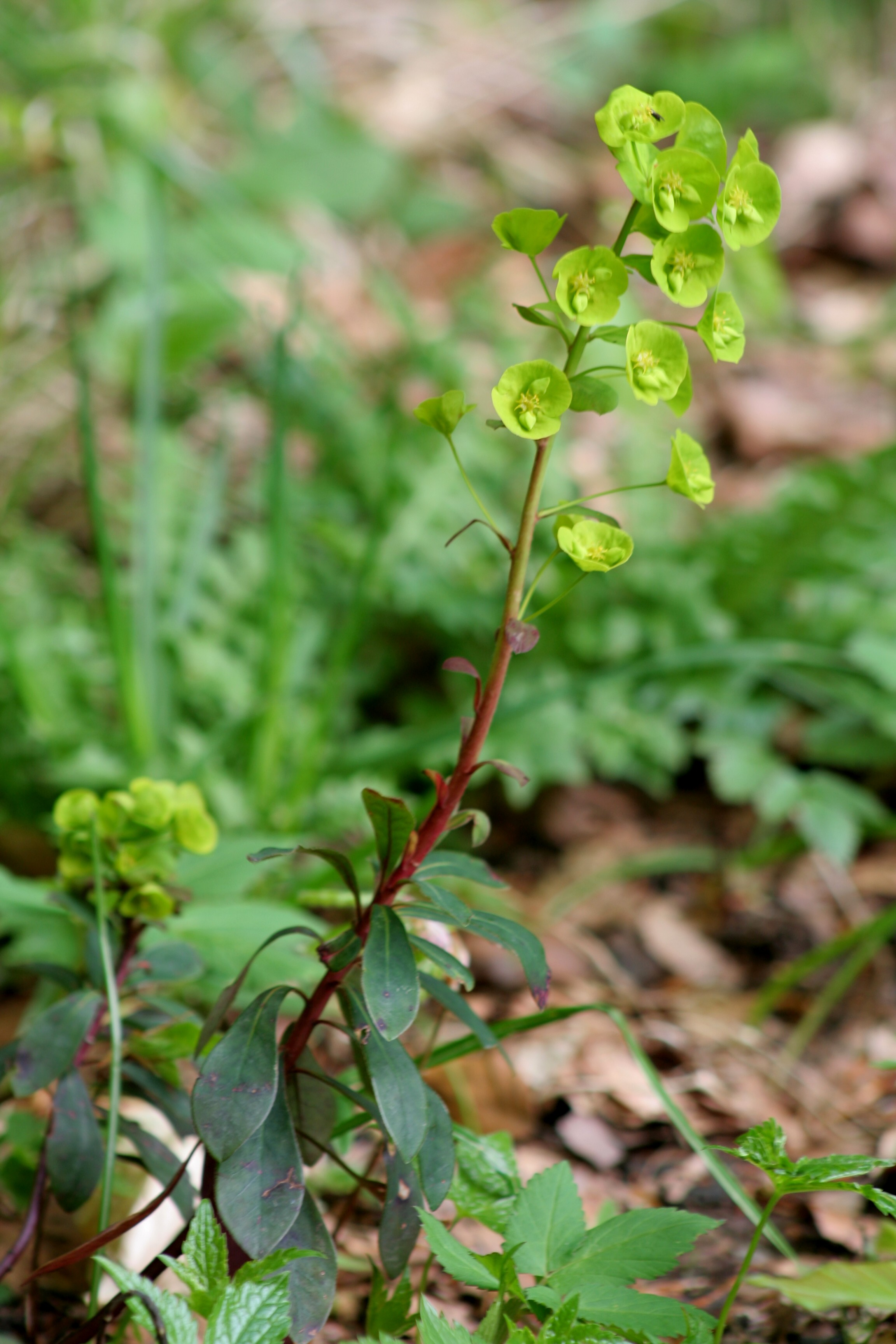 Euphorbia_amygdaloides - Località : Melere, Trichiana (BL), 843 m s.l.m.